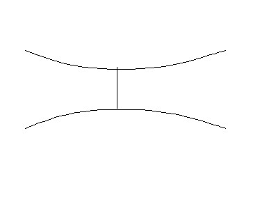 Iperparallele